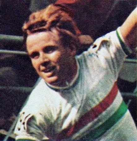 Hennie Kuiper en 1973